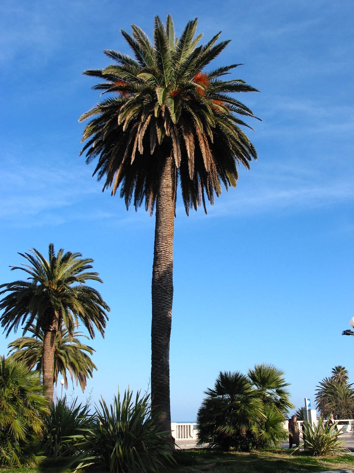 Una delle antiche palme presenti lungo la Riviera delle Palme.